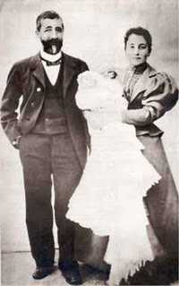 Francisco Franco y sus padres el día de su bautizo (1892).